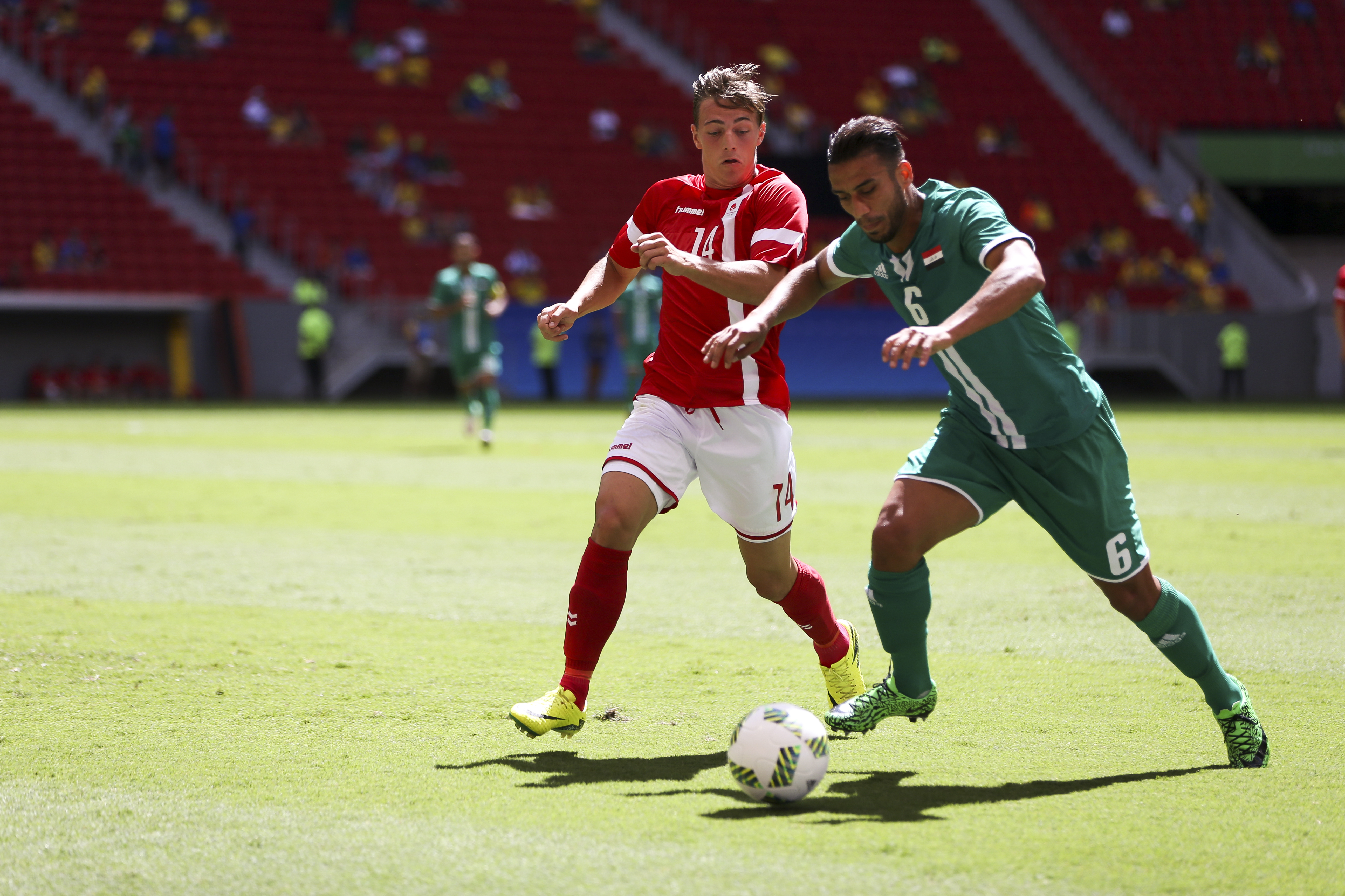 Brasília - A seleção do Iraque enfrenta a seleção da Dinamarca pela primeira fase do futebol olímpico, no estádio Mané Garrincha ( Marcelo Camargo/Agência Brasil)